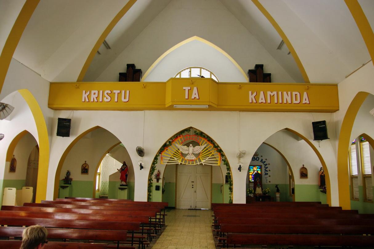 Kath. Kirche, Kralendijk, Bonaire, Schrift in Papiamento